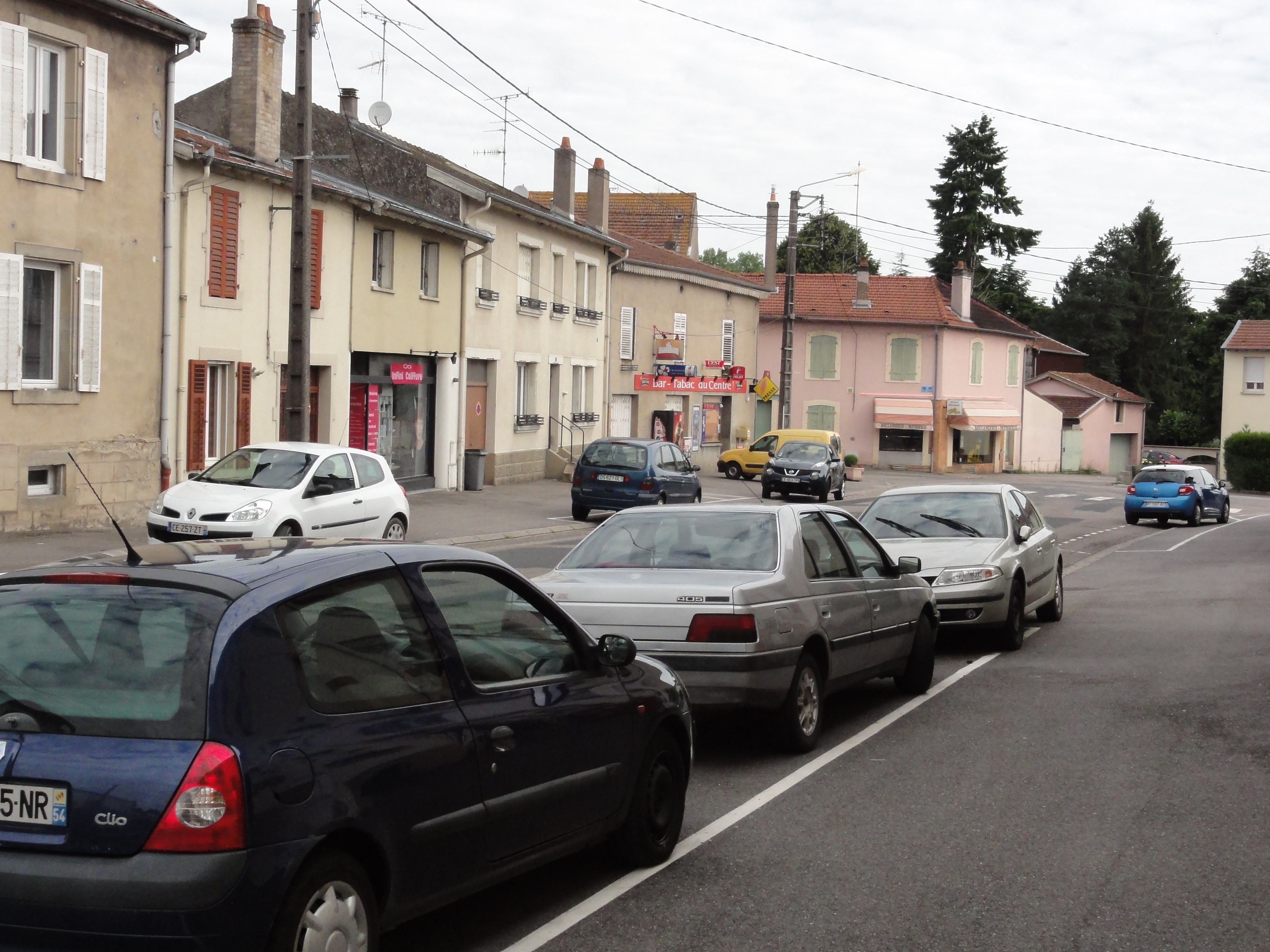 Chanteheux (M-et-M) rue principale, commerces